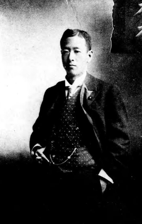 松平直徳子爵（1869～1931）